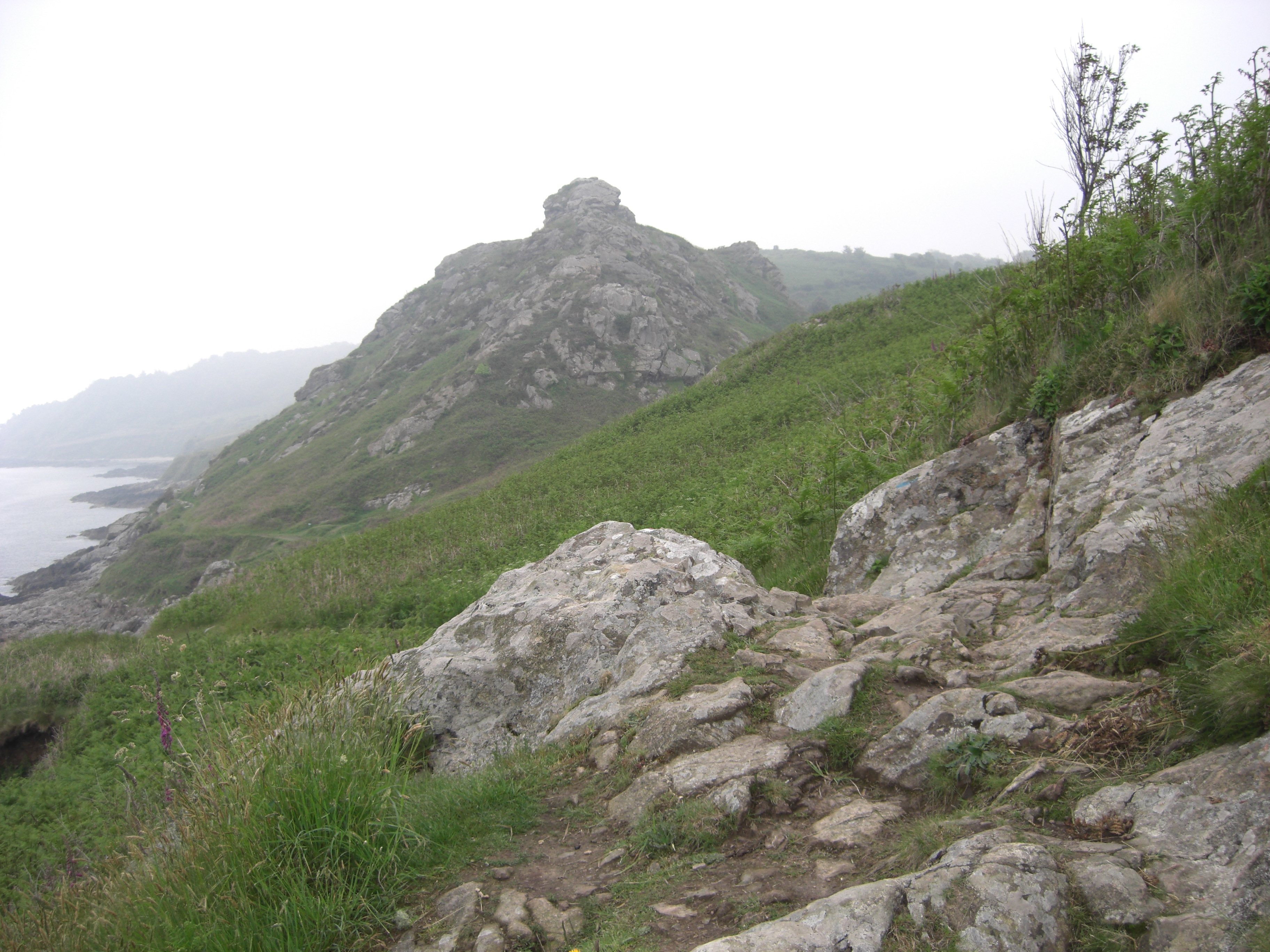 Rocher du Castel Vendon Gréville-Hague